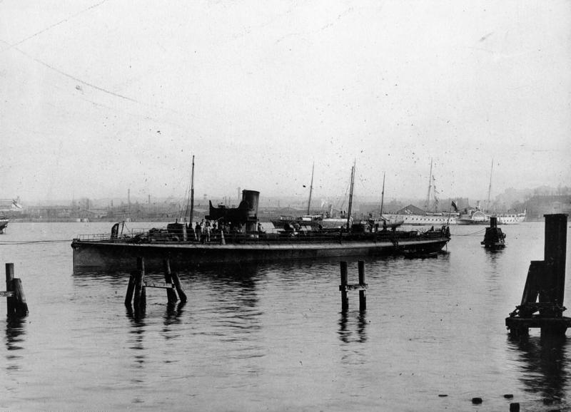 Divisions-Boot D 7